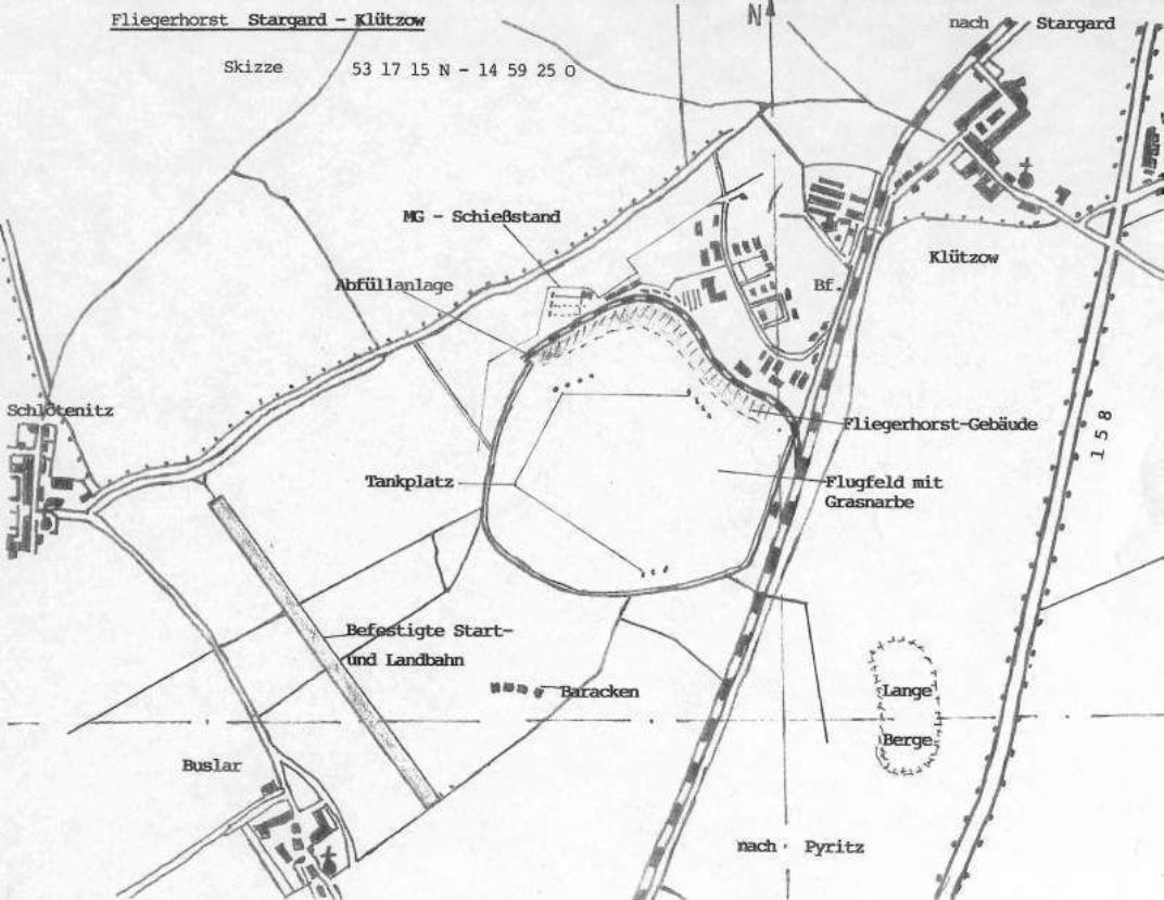 Niemiecka mapa Kluetzow, 1940